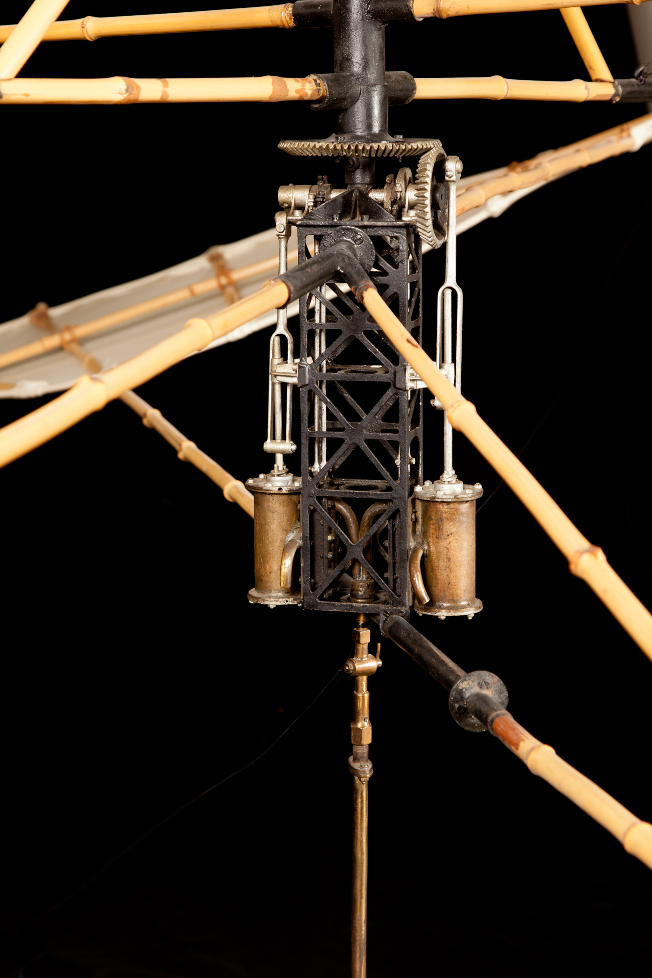 Elicottero sperimentale Enrico Forlanini. Modello esposto al Museo nazionale della scienza e della tecnologia Leonardo da Vinci, Milano.